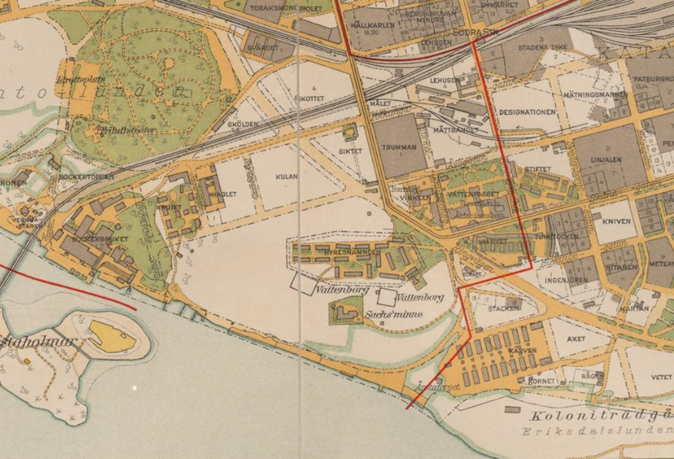 Årstalunden kring 1920 med båda vattenreservoarer. Detaljerad karta över Stockholm med omnejd. Upprättad mellan 1917 och 1934.